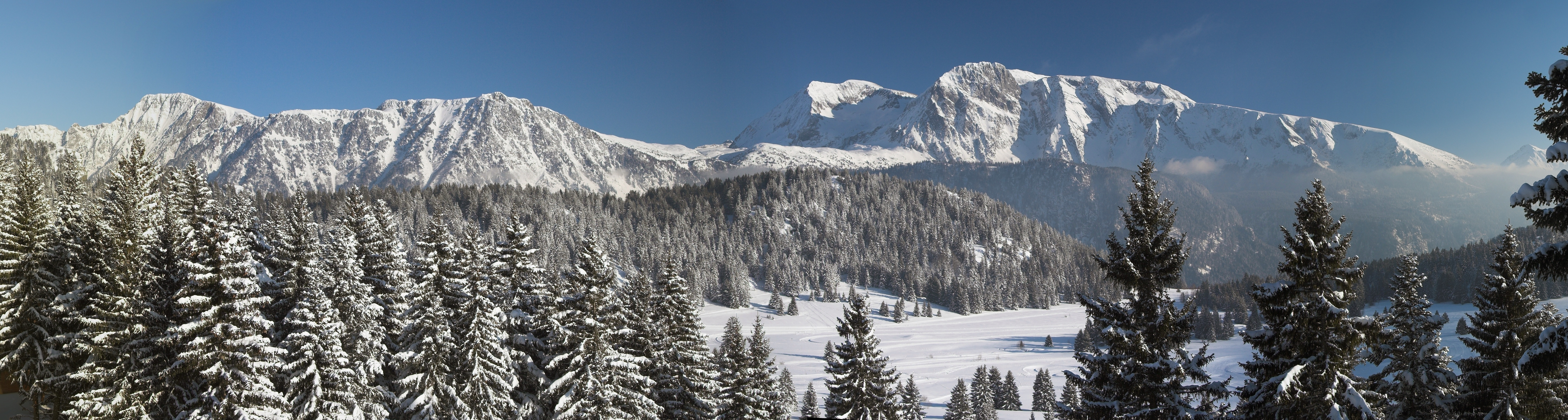 Tájkép Bachat-Bouloud nevű faluból délkeleti irányba fényképezve, előtérben az l'Arselle-fennsíkkal. Háttérben a Taillefer-hegység látható a Grand Galbert, Pyramide és Taillefer csúcsokkal. A két hegyvonulat között a Romanche-folyó több mint 1000 méter mély völgye húzódik. (Belledonne-hegység, Alpok, Franciaország)